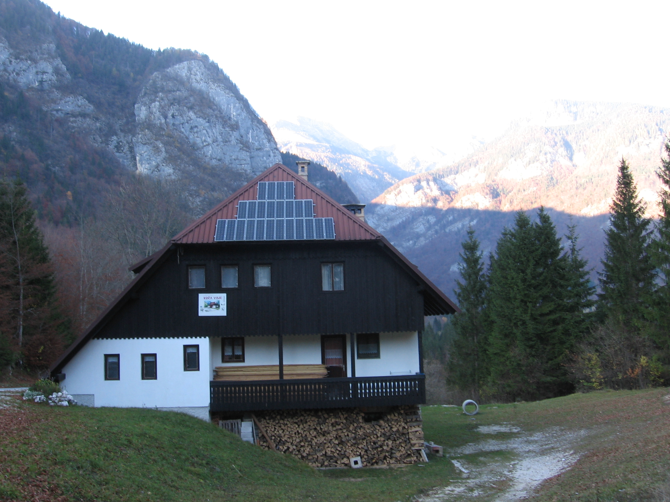 Planinska koča na Vojah